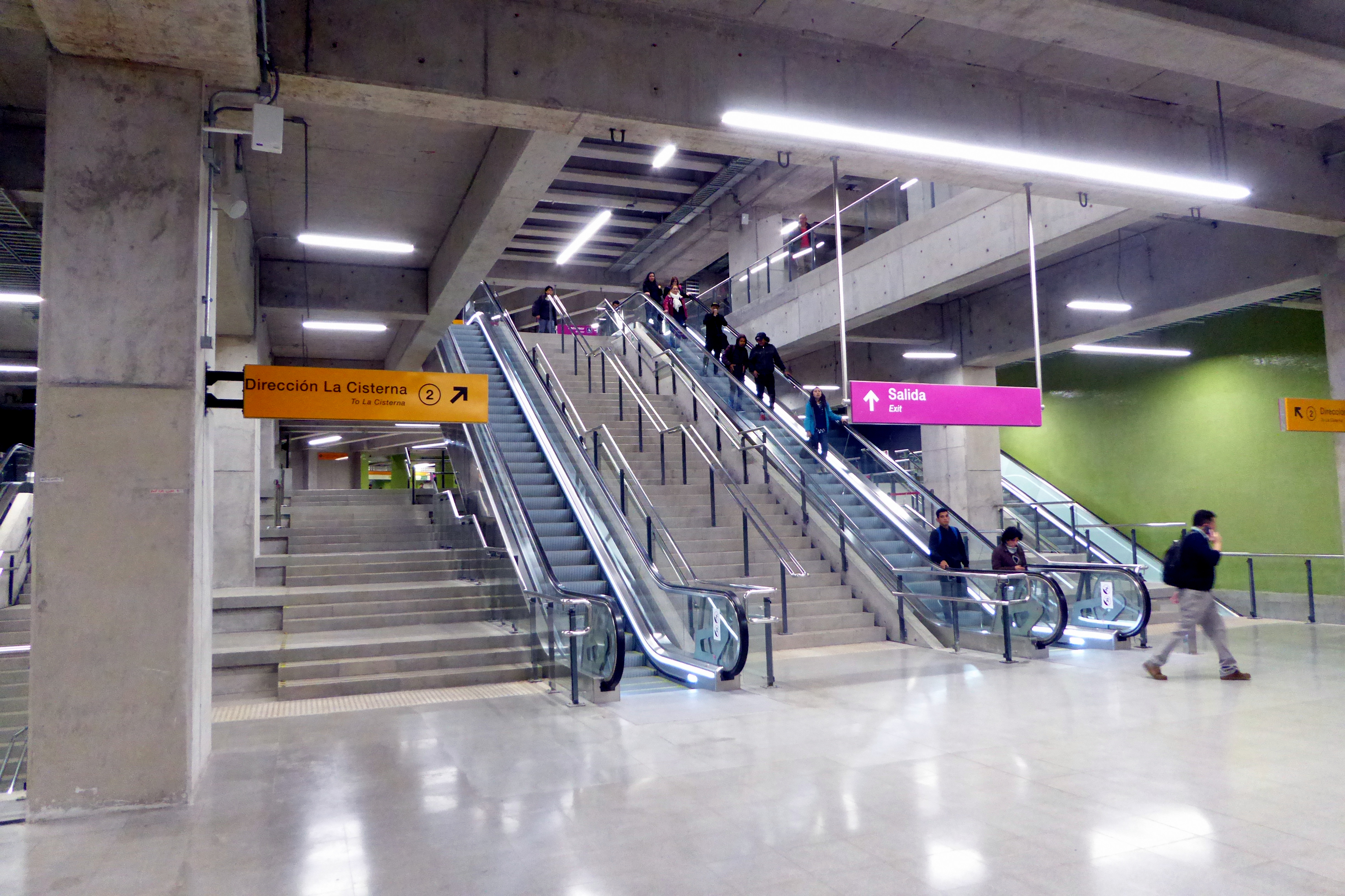 Mesanina de combinación en estación Franklin, entre la Línea 2 y la Línea 6 del Metro de Santiago.